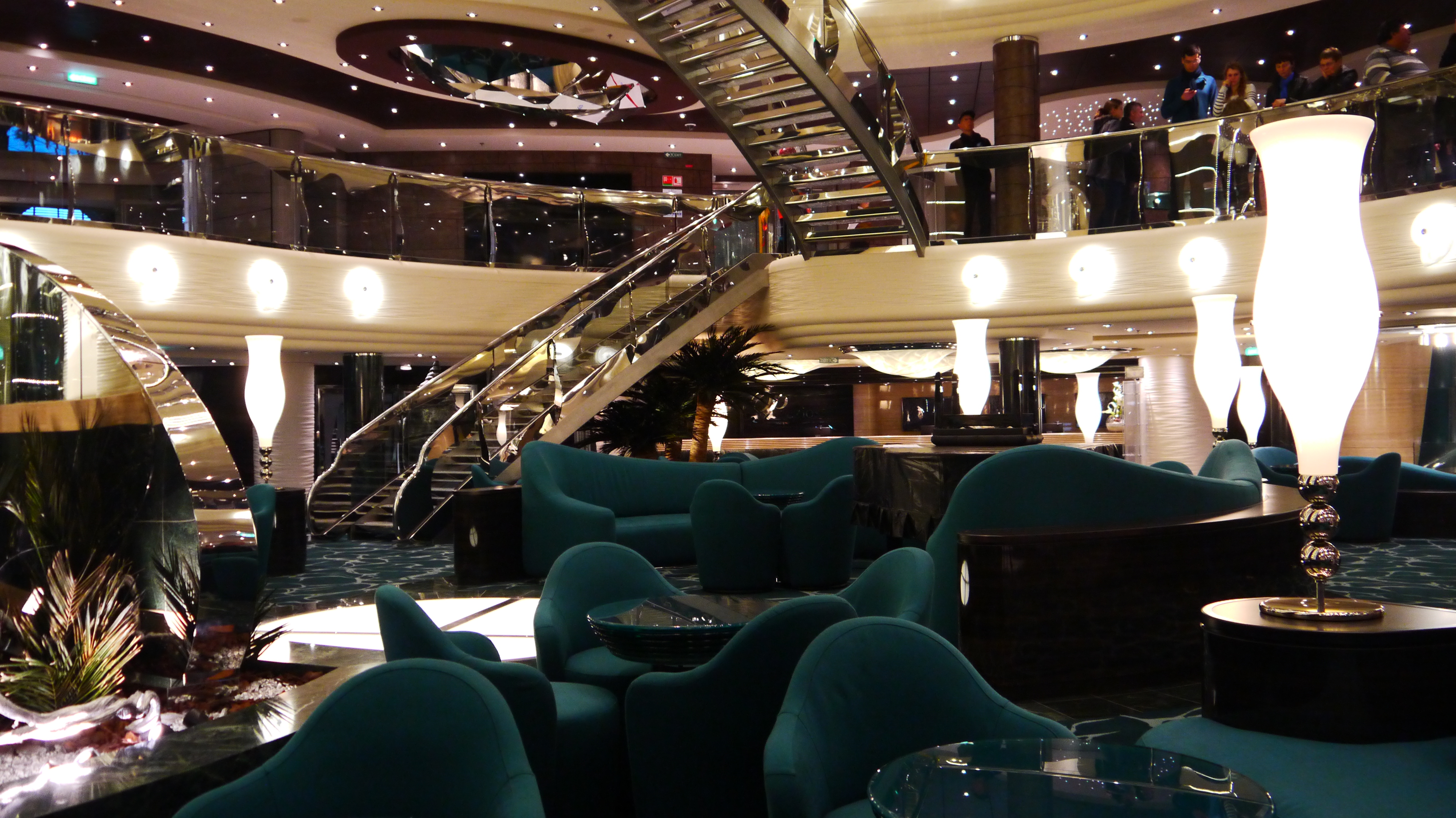 Le palace flottant "MSC Preziosa" prêt à être livré par les chantiers STX France à Saint-Nazaire.